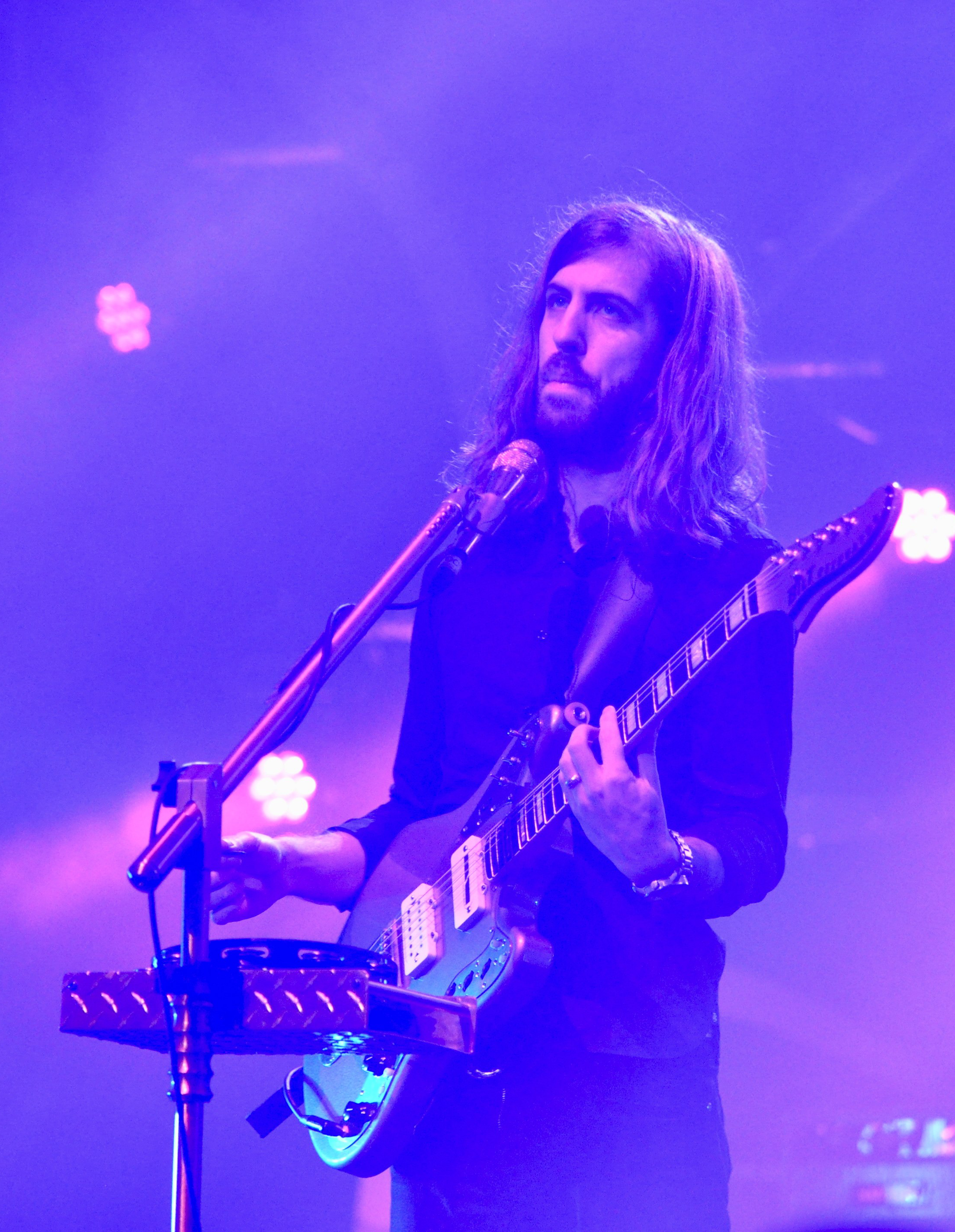 Wayne Sermon en 2014